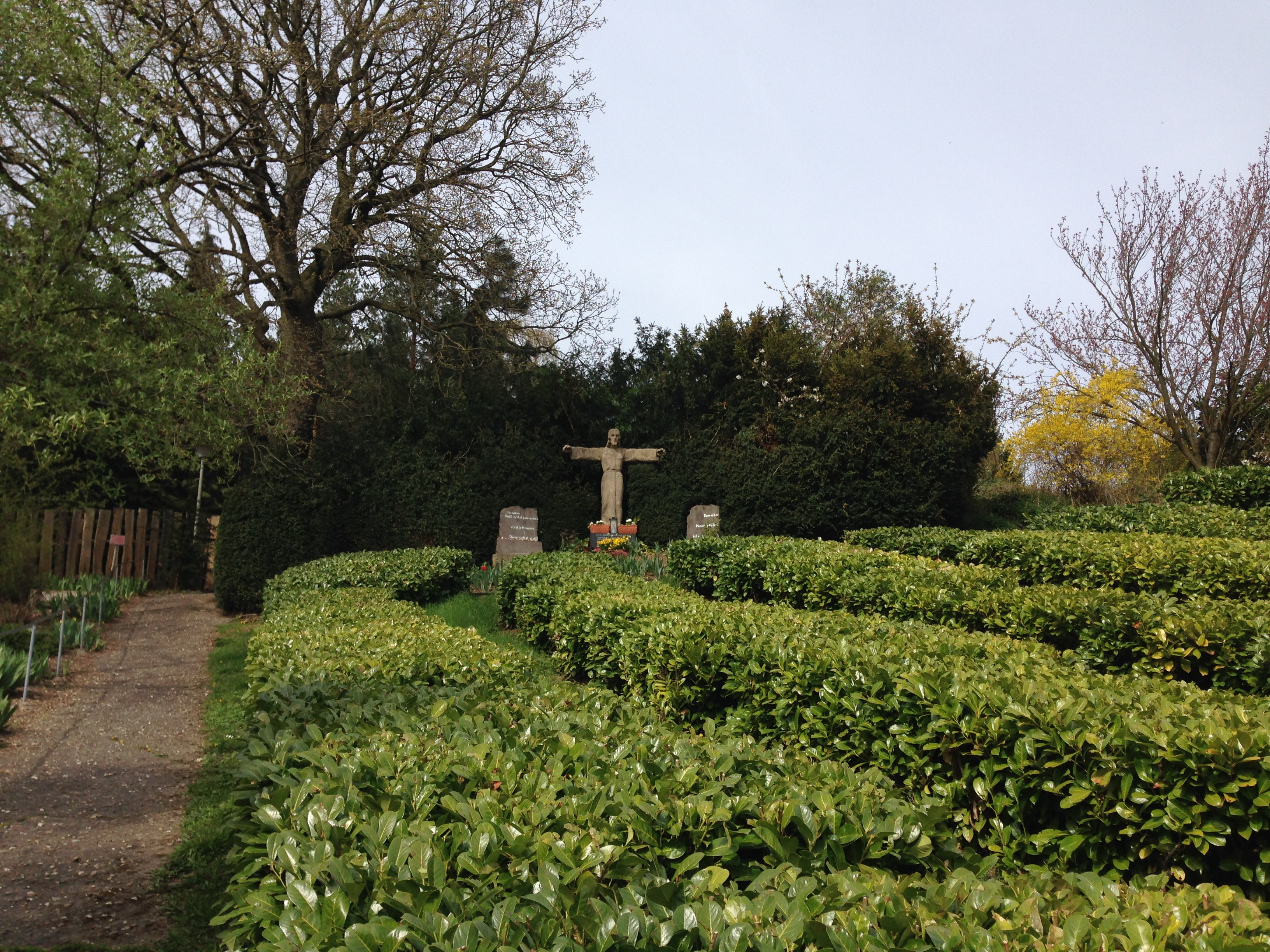 Segnender Christus (Alfter)